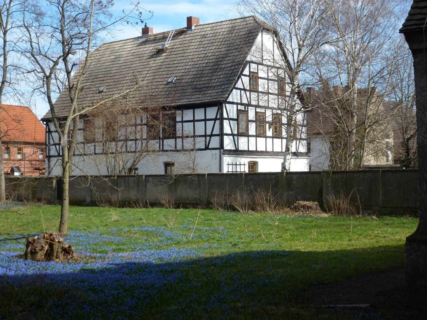 Fachwerk neben der Brinniser Kirche